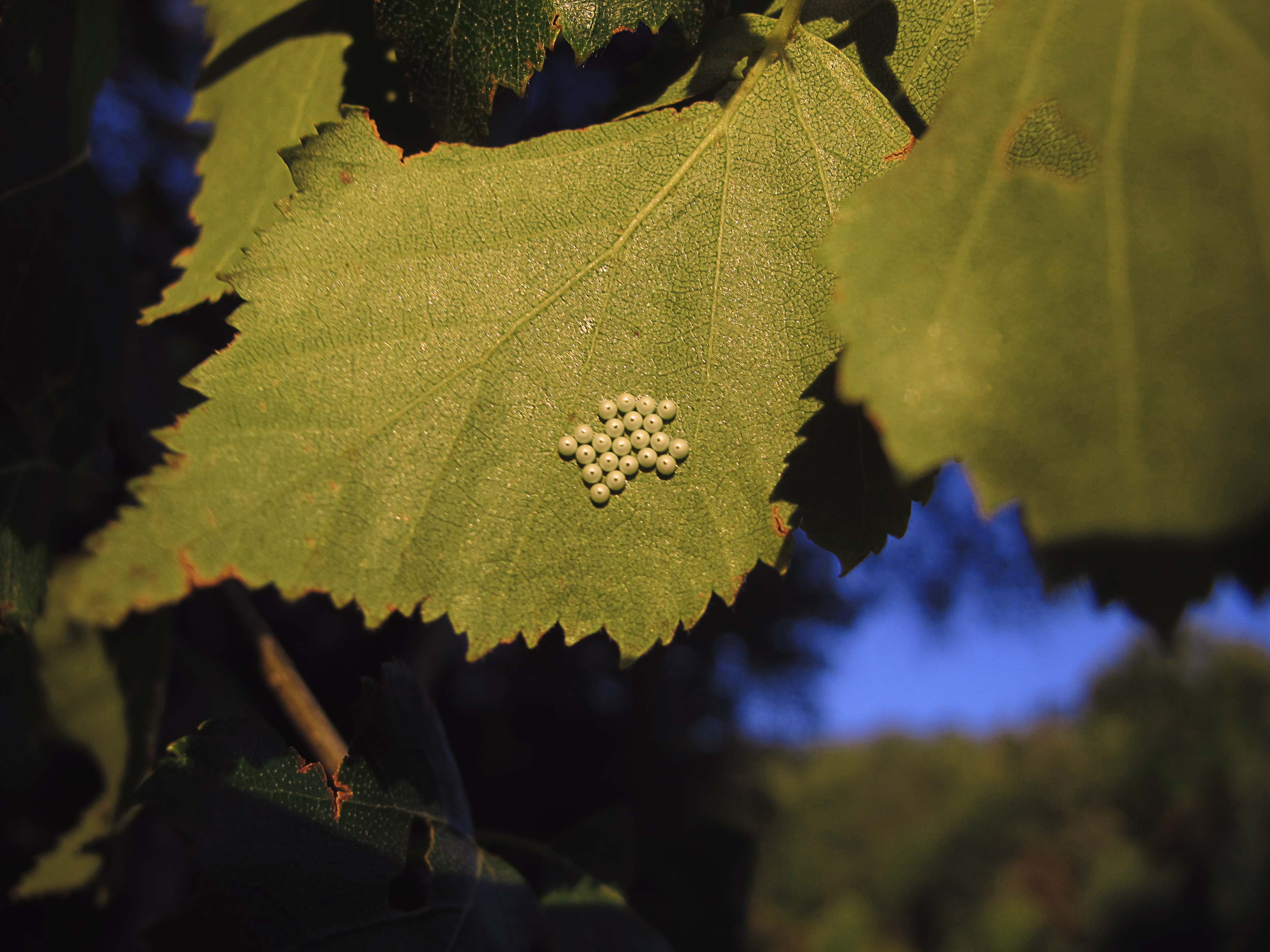 Posiblemente de la mariposa nocturna "Pájaro luna" Phalera bucephala